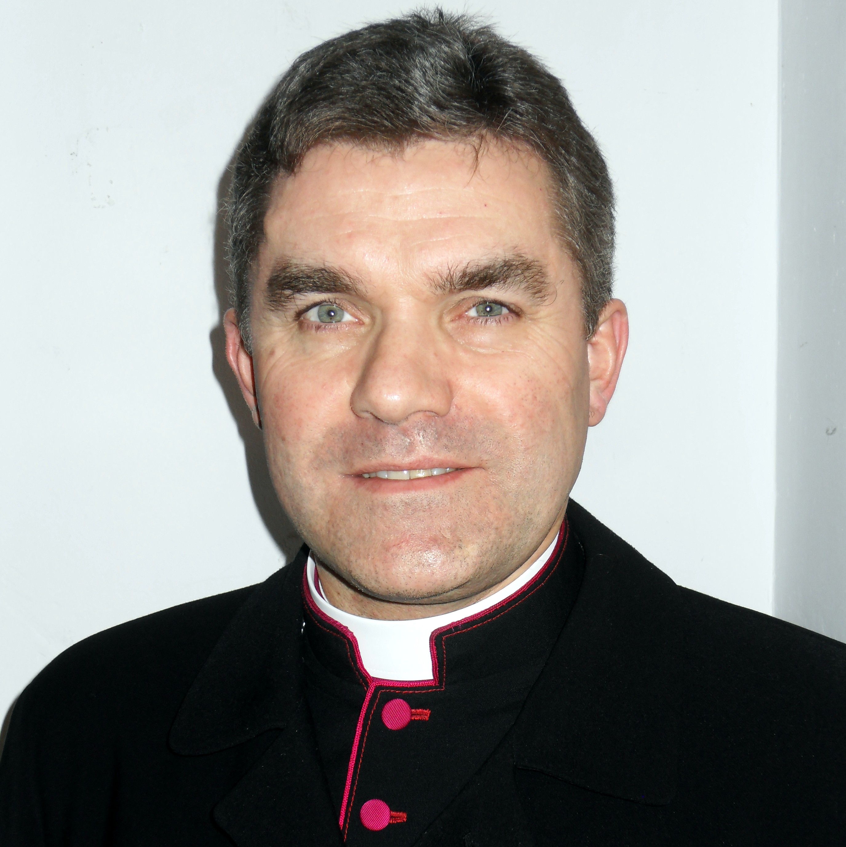 Ks. dr Zbigniew Zieliński, gdański biskup pomocniczy.